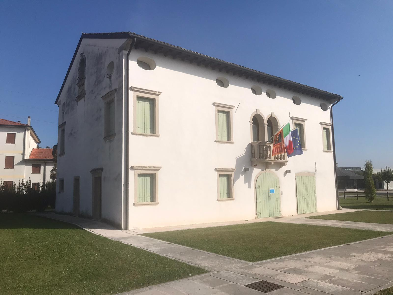 La foto rappresenta la storica Villa Altan di Campomolino di Gaiarine.